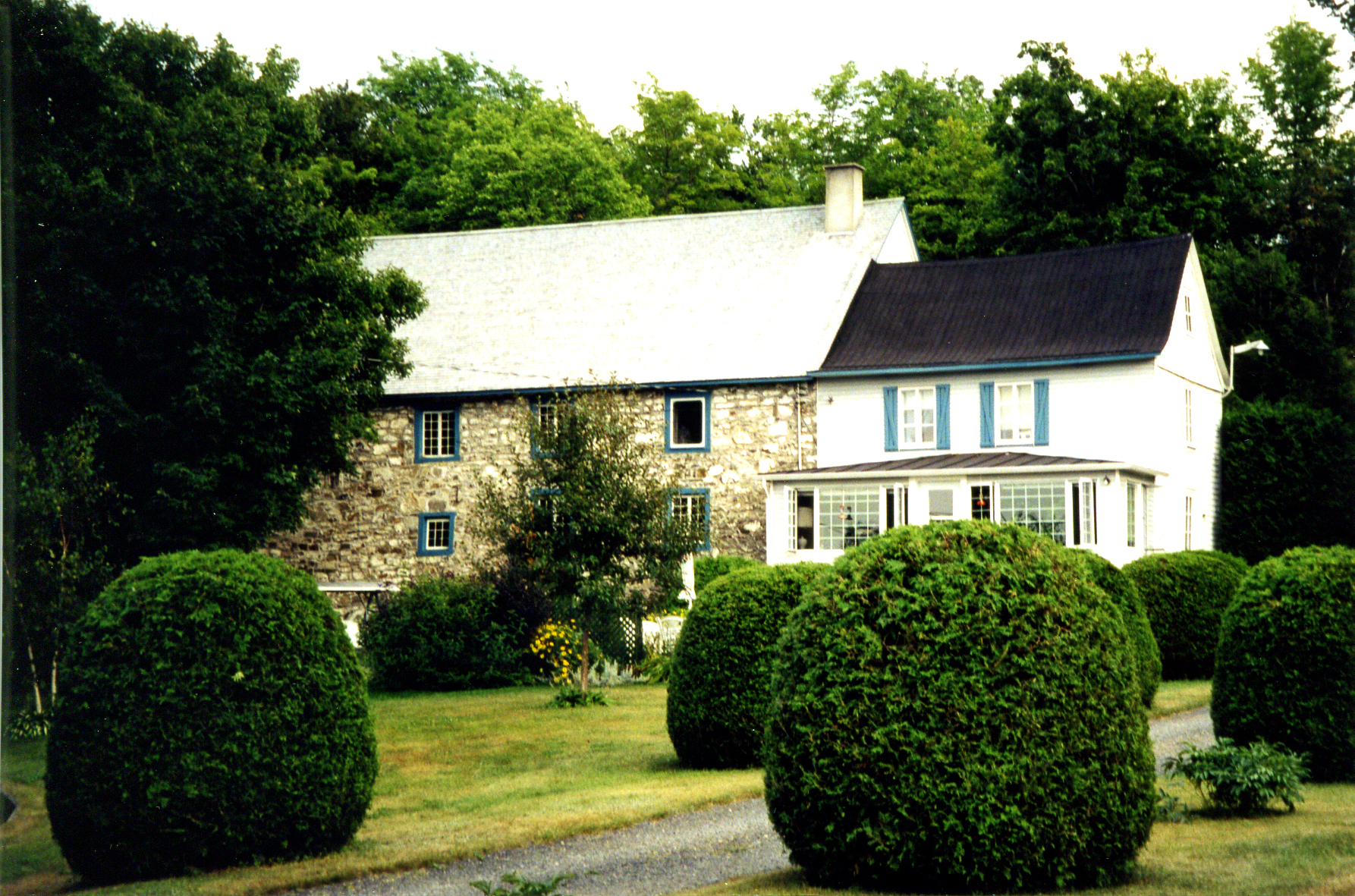 Arrière du Moulin du Petit Canton à Saint-Vallier (Chaudière-Appalaches, Québec). Moulin à eau; moulin à farine.